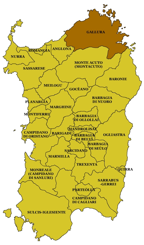 Sardinian Subregions